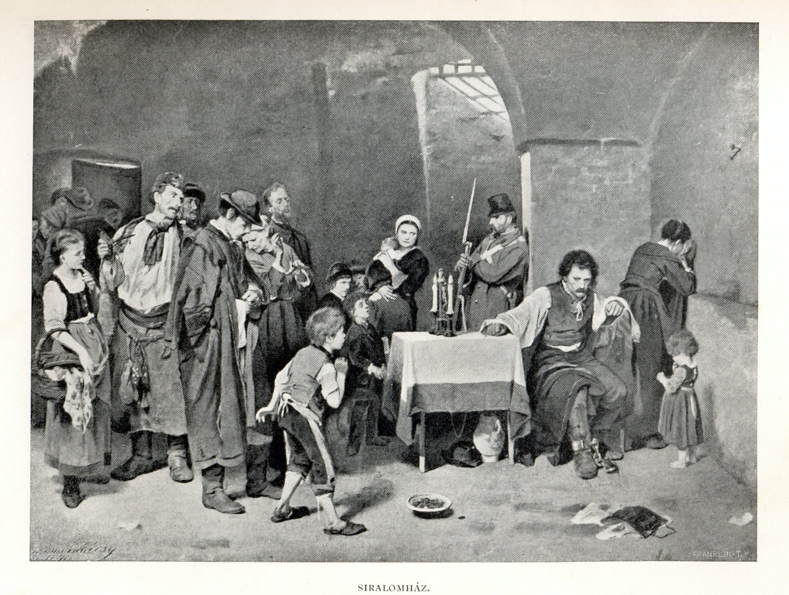 Munkácsy Mihály: Siralomház